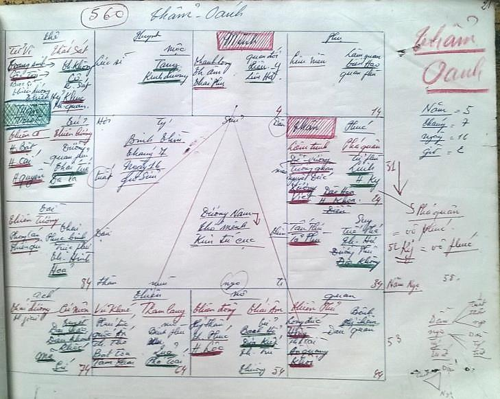 Thầm Oánh2